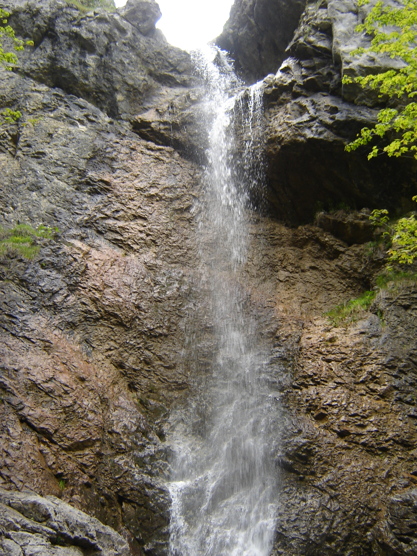 Vodopád v Prosieckej doline